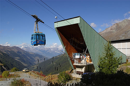 Luftseilbahn hinauf zum Staudamm (Barrage Grande Dixence)